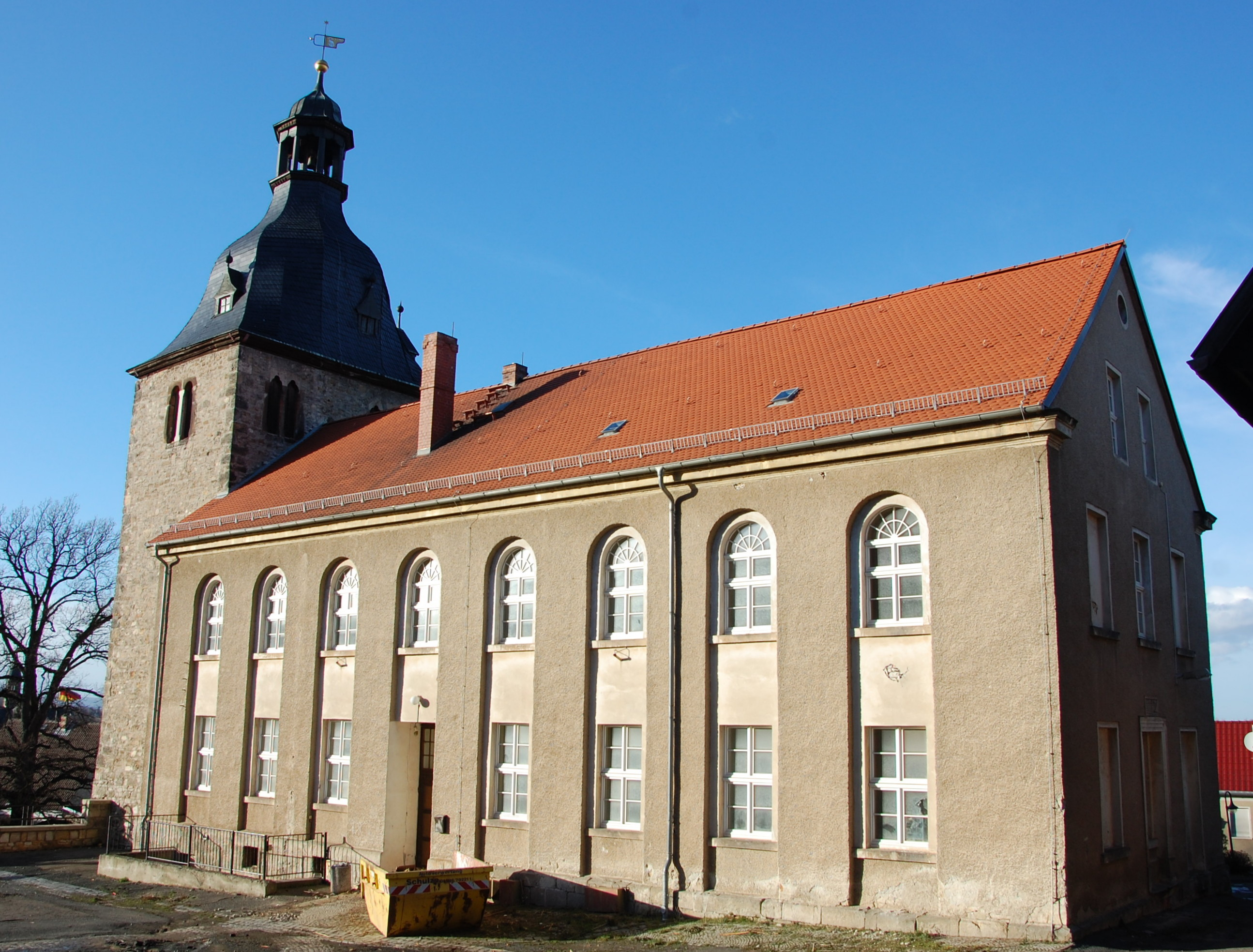 Haus Schulplatz 4 in Gernrode